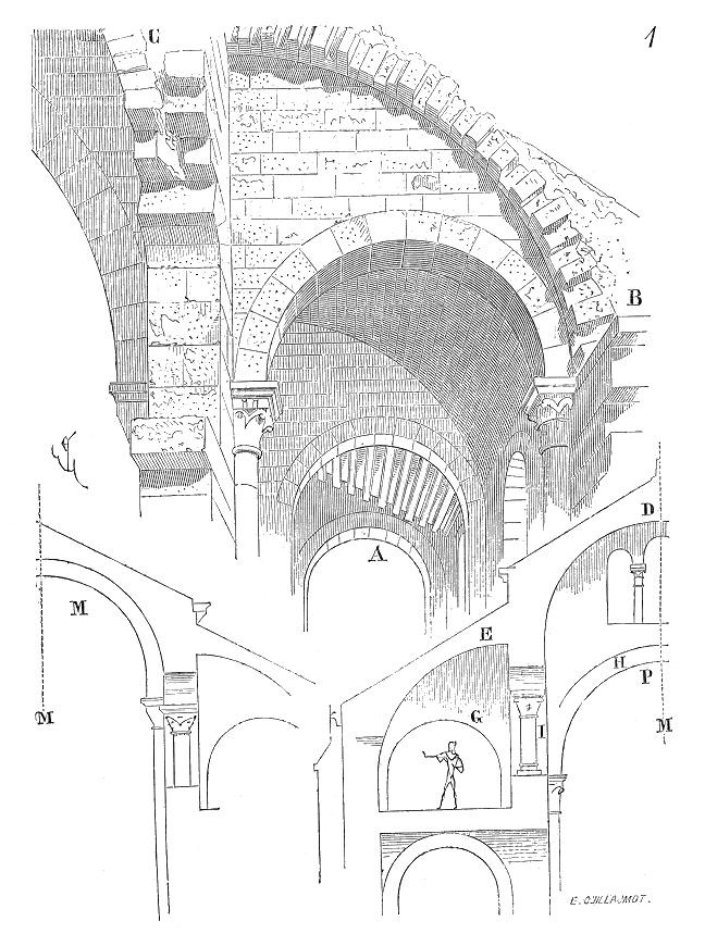 ... Dès la fin du XIe siècle, l'école auvergnate arrivait à ce résultat, dont on peut encore constater l'efficacité, si l'on visite les églises d'Issoire, de Saint-Nectaire, de Notre-Dame du Port à Clermont, de Saint-Etienne de Nevers, et même de Saint-Sernin de Toulouse. Les arcs-doubleaux des galeries primitives (voyez la figure 1 de l'article Travée) étaient conservés, et le solivage de bois incliné était remplacé par ce demi-berceau sur lequel on posait à cru la couverture de tuiles ou de dalles. La figure 1 explique cette modification dans les procédés primitifs. En A, on voit encore la travée de la galerie avec ses arcs-doubleaux au droit des piles, et son solivage portant la couverture; en B, le solivage est remplacé par un demi-berceau contre-butant la poussée continue du berceau central C. N'oublions pas, d'ailleurs, qu'avant de se décider à jeter des voûtes sur les hautes nefs, on avait commencé par se contenter d'arcs-doubleaux portant, en partie, la charpente et la couverture ...